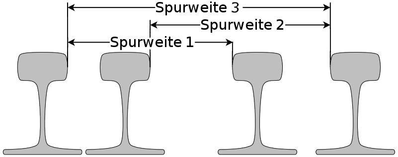 Darstellung der Spurweiten bei einem Vierschienengleis